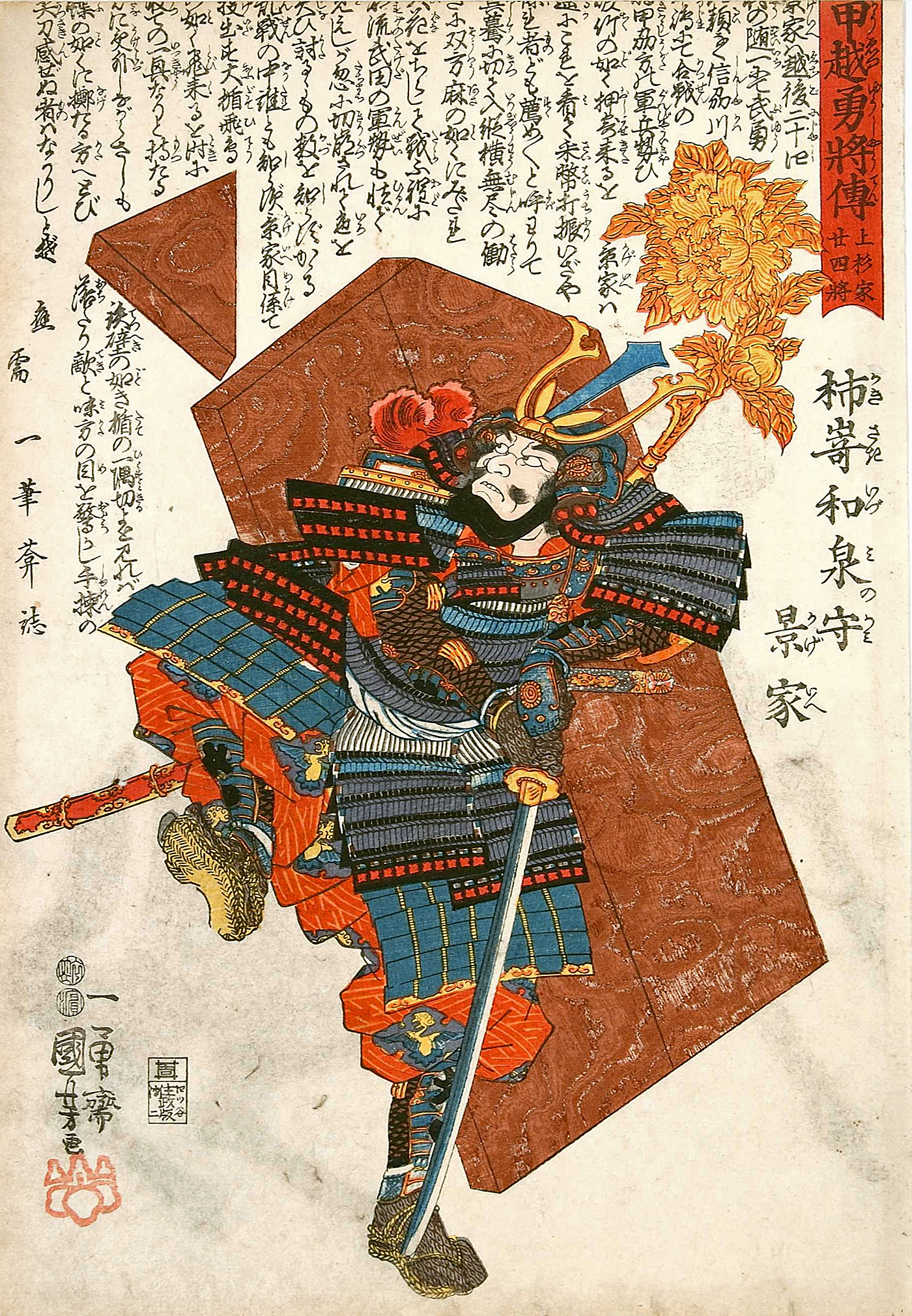 「甲越勇将伝・上杉家廿四将：柿崎和泉守景家」 1847年作